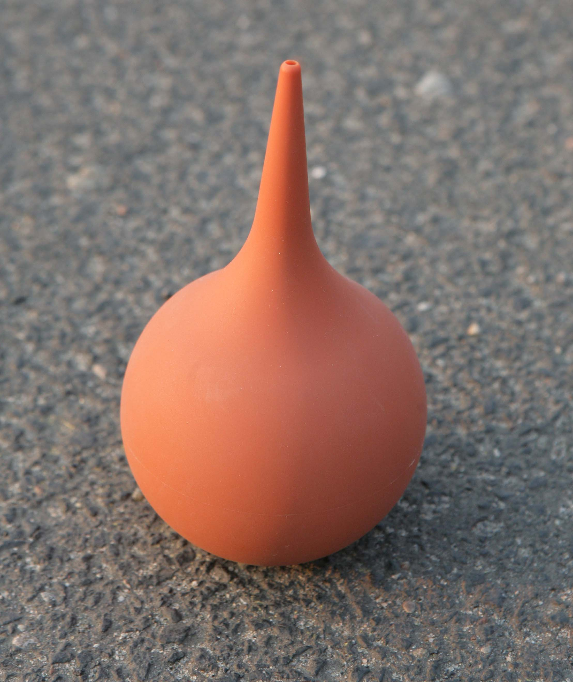 Gruszka (narzędzie do pielęgnacji) (fot.: Cezary Piwowarski)